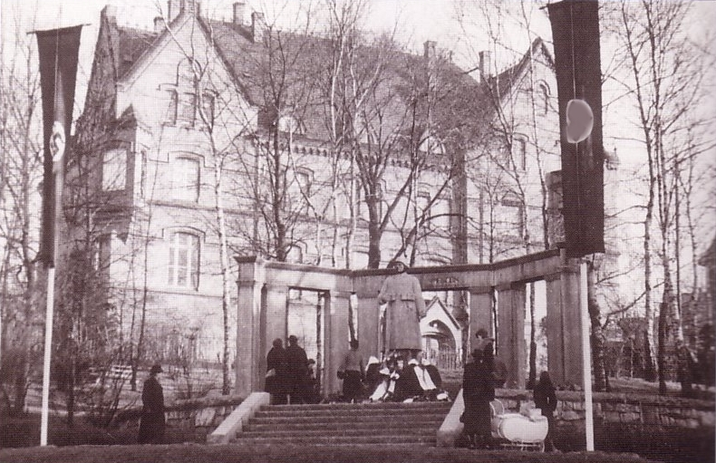 altes Kriegerdenkmal in Aue